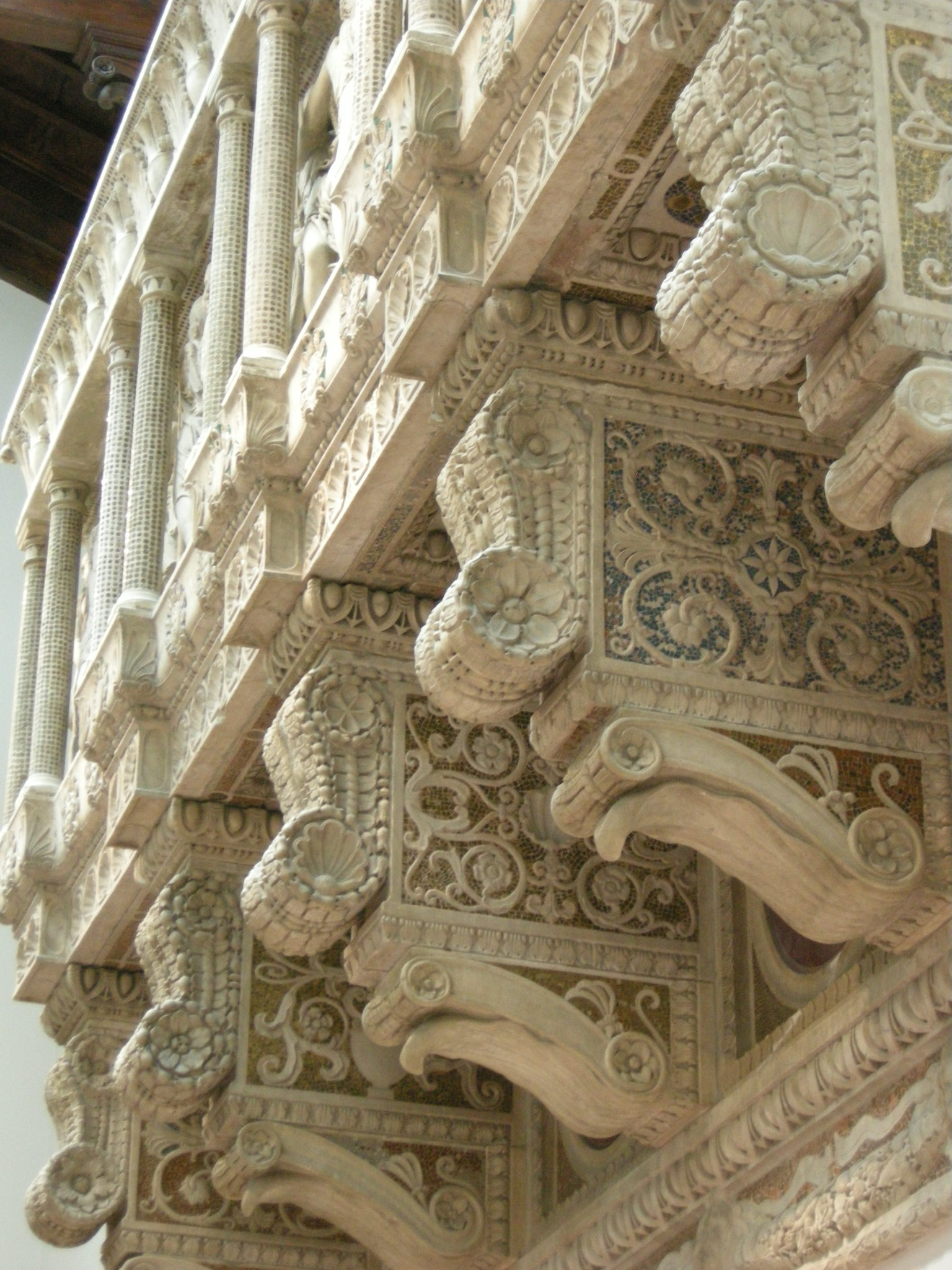 Cantoria di donatello, base